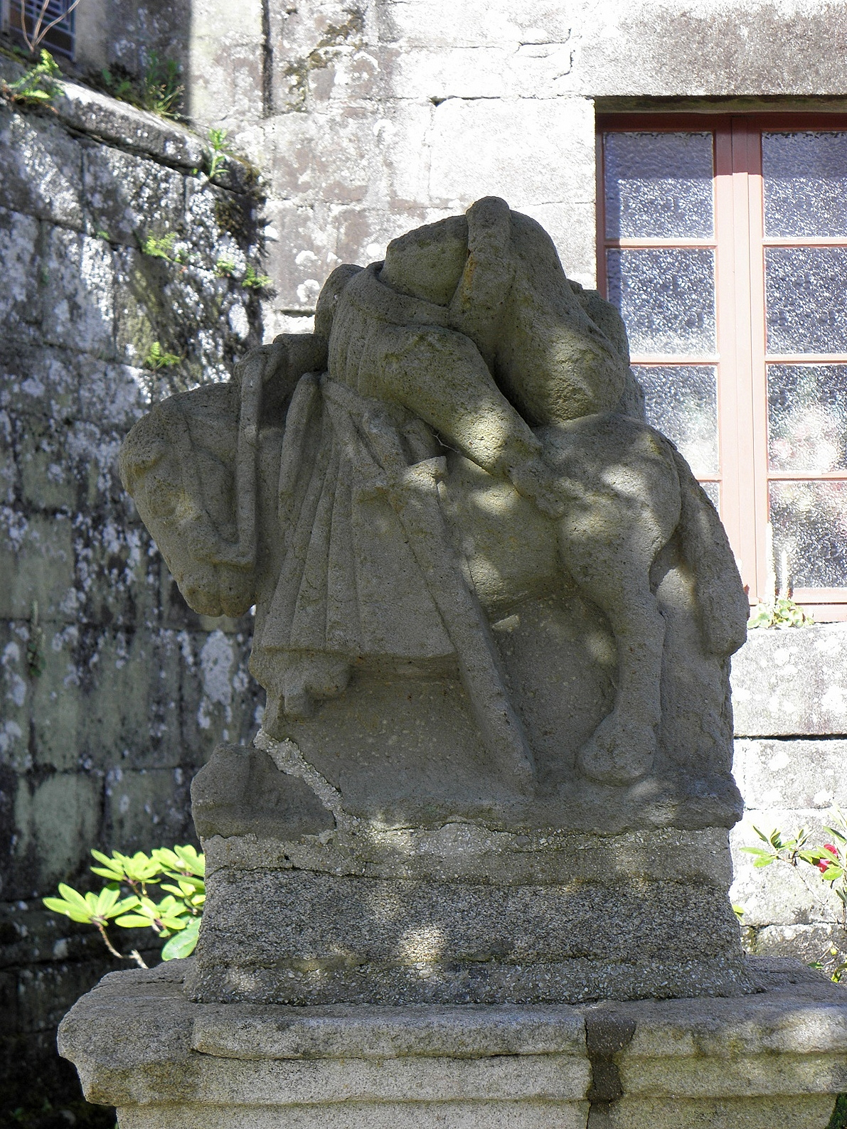 Église Saint-Germain et Saint-Louis de Laz (29). Statue de cavalier au chevet de l'église.